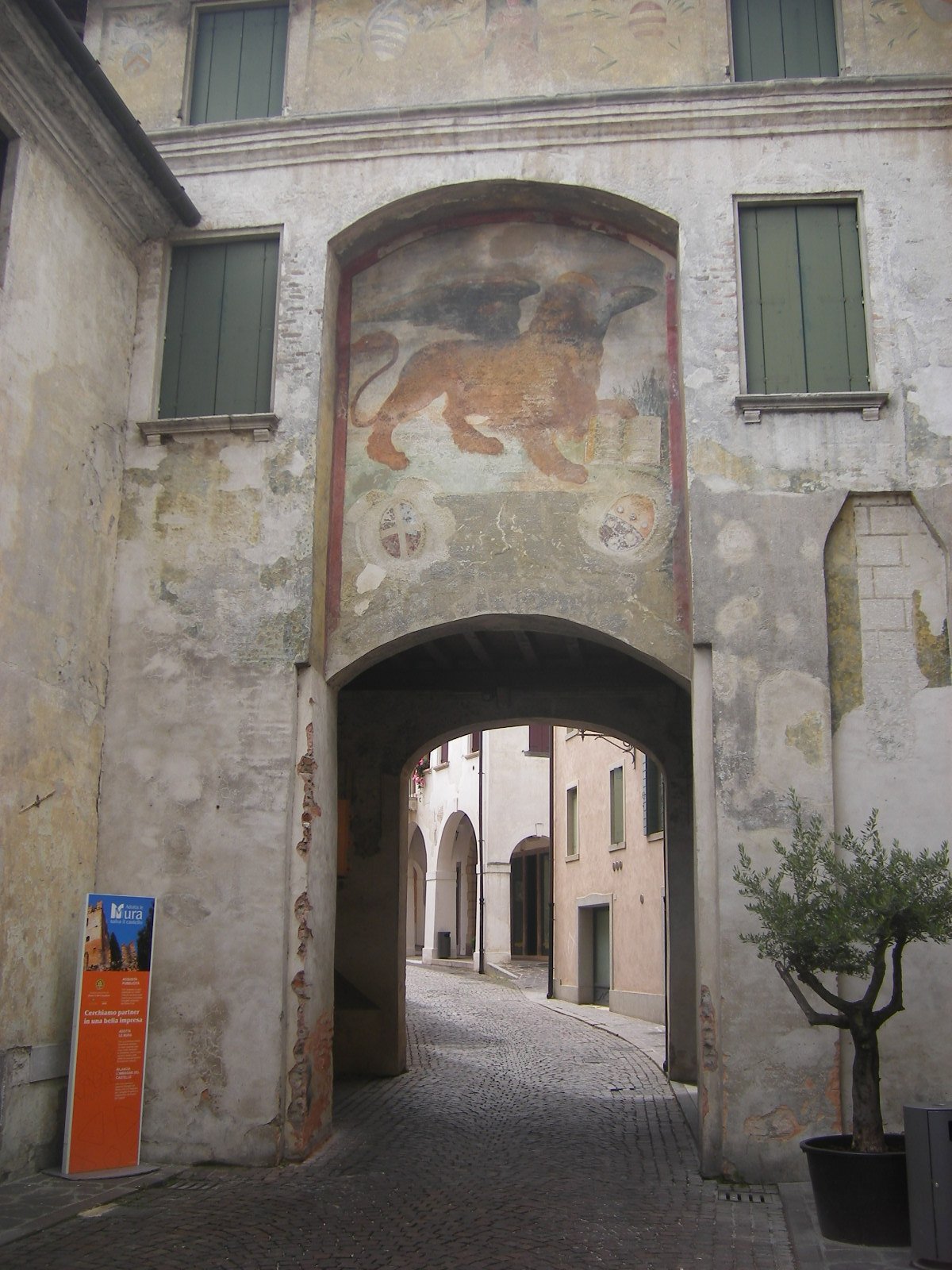 Conegliano, Porta Monticano